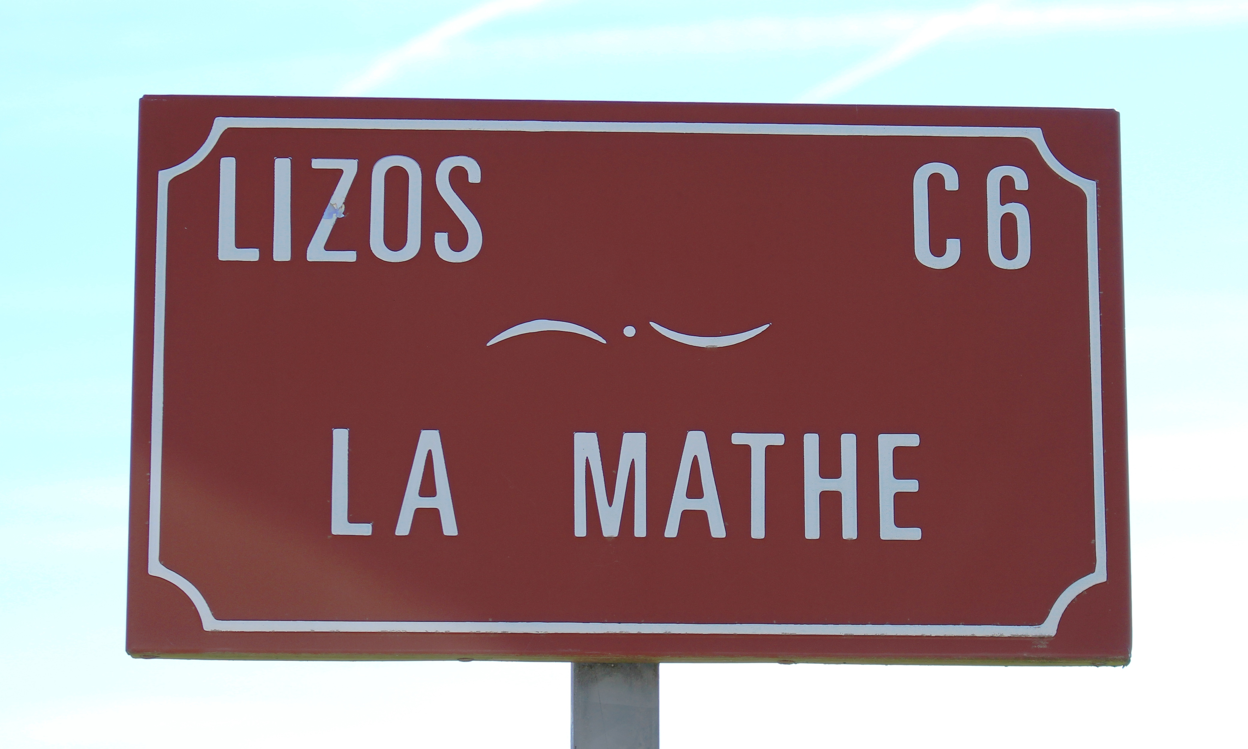 Rue du village de Lizos (Hautes-Pyrénées)